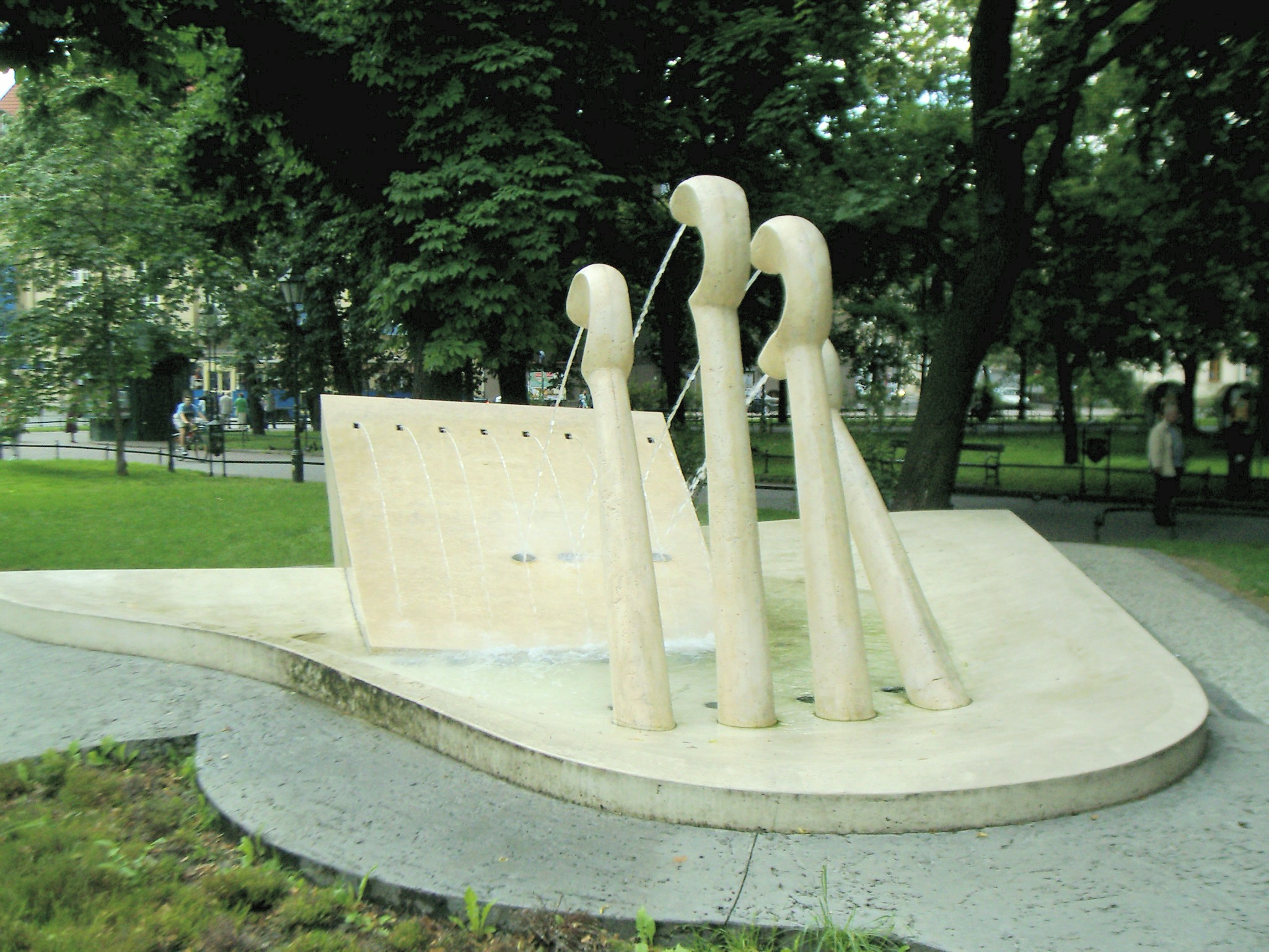 Ekologiczna fontanna. Kraków ul. Franciszkańska.